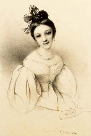 Lithograpie nach einem Gemälde von Eduard Clemens Fechner. Paris